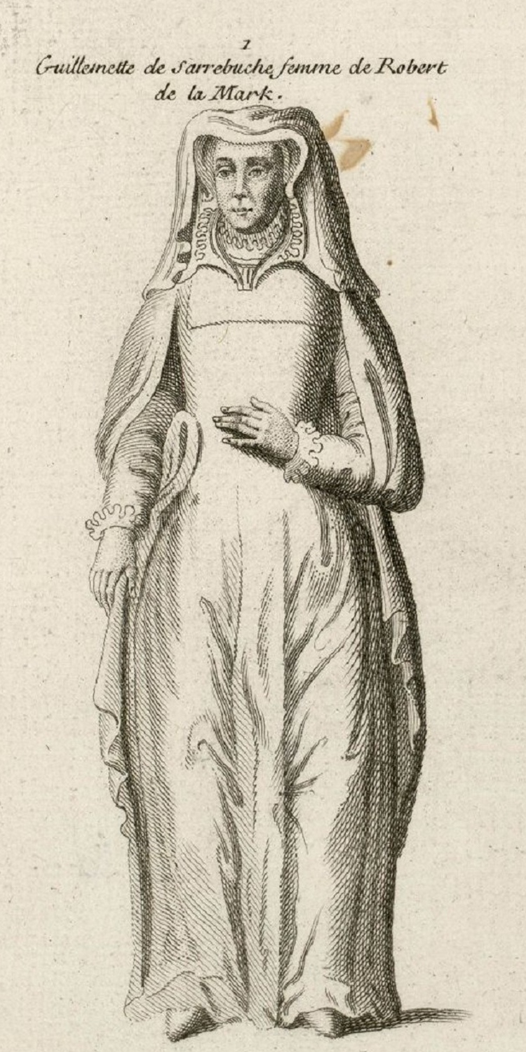 Comtesse de Braine, dame de Montagu, de Neufchâtel, de Poutarcy et de La Ferté-Gaucher